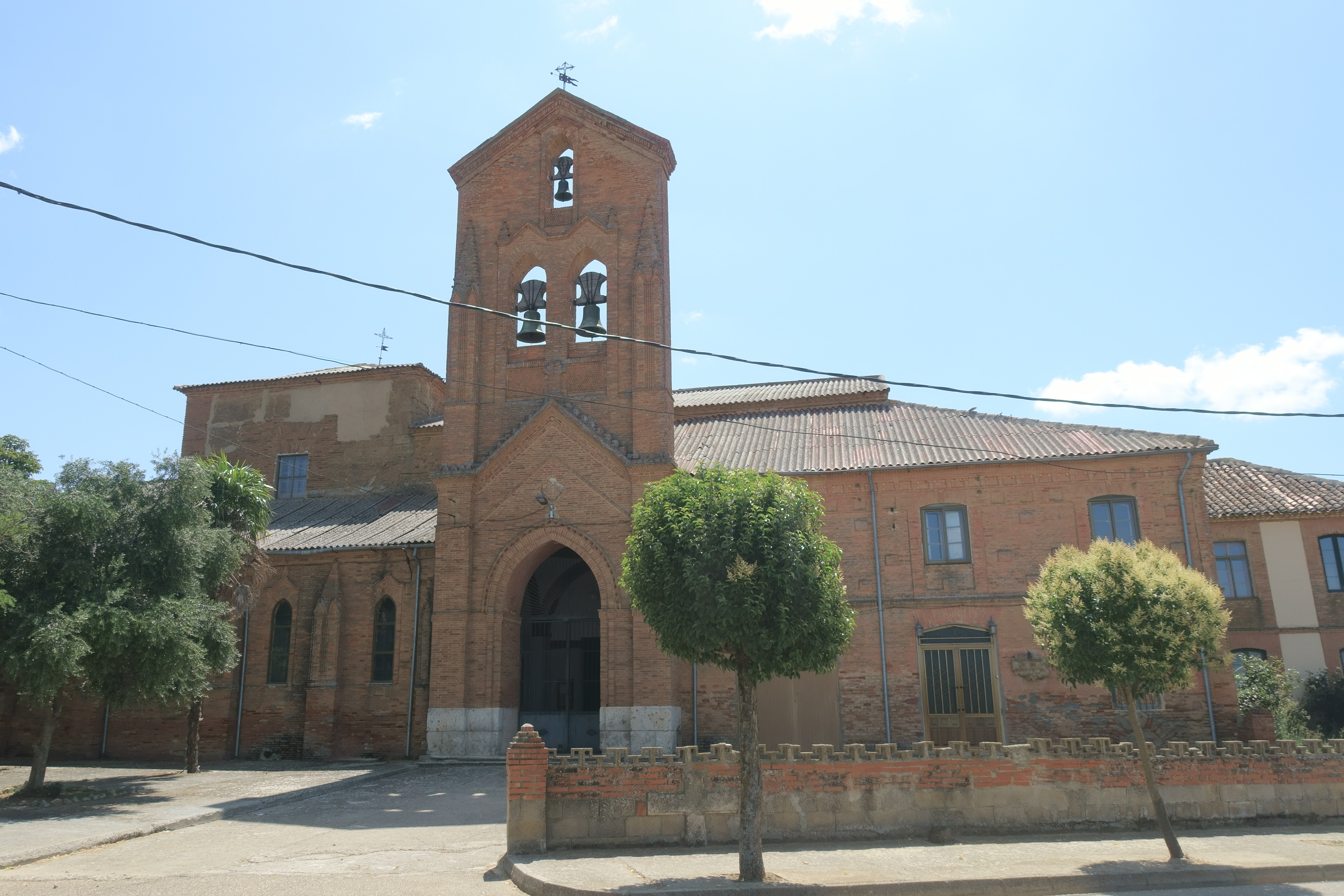 Convento de la Purísima Concepción, de la orden franciscana, en Castroverde de Campos (Zamora, España).